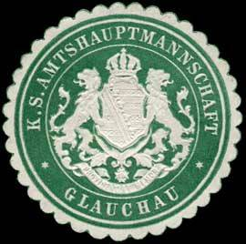 Sealing stamp Title: Königlich Sächsische Amtshauptmannschaft - Glauchau Description: grün, weiß, geprägt Place: Glauchau size: 4 cm